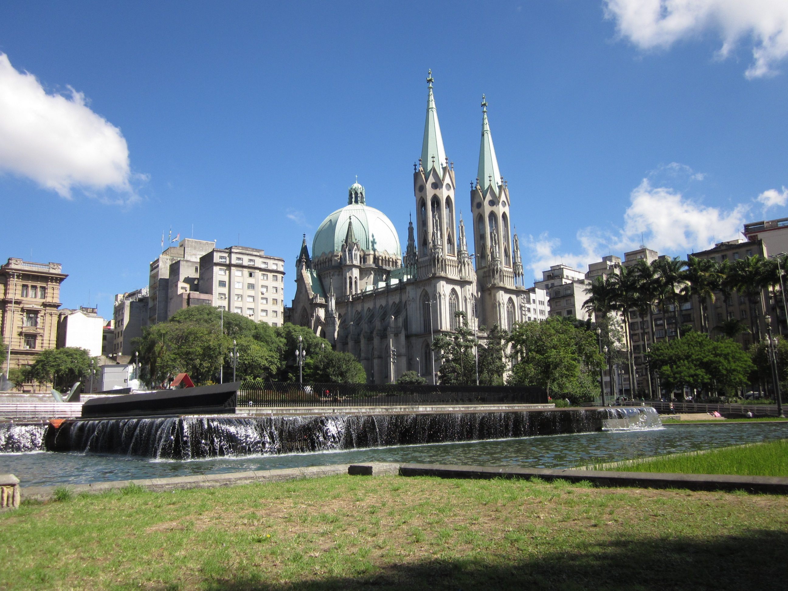 Catedral da Sé, São Paulo Downtown, São Paulo.